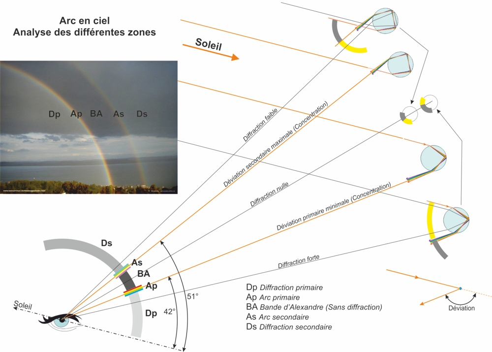 Arc en ciel synthèse du phenomène